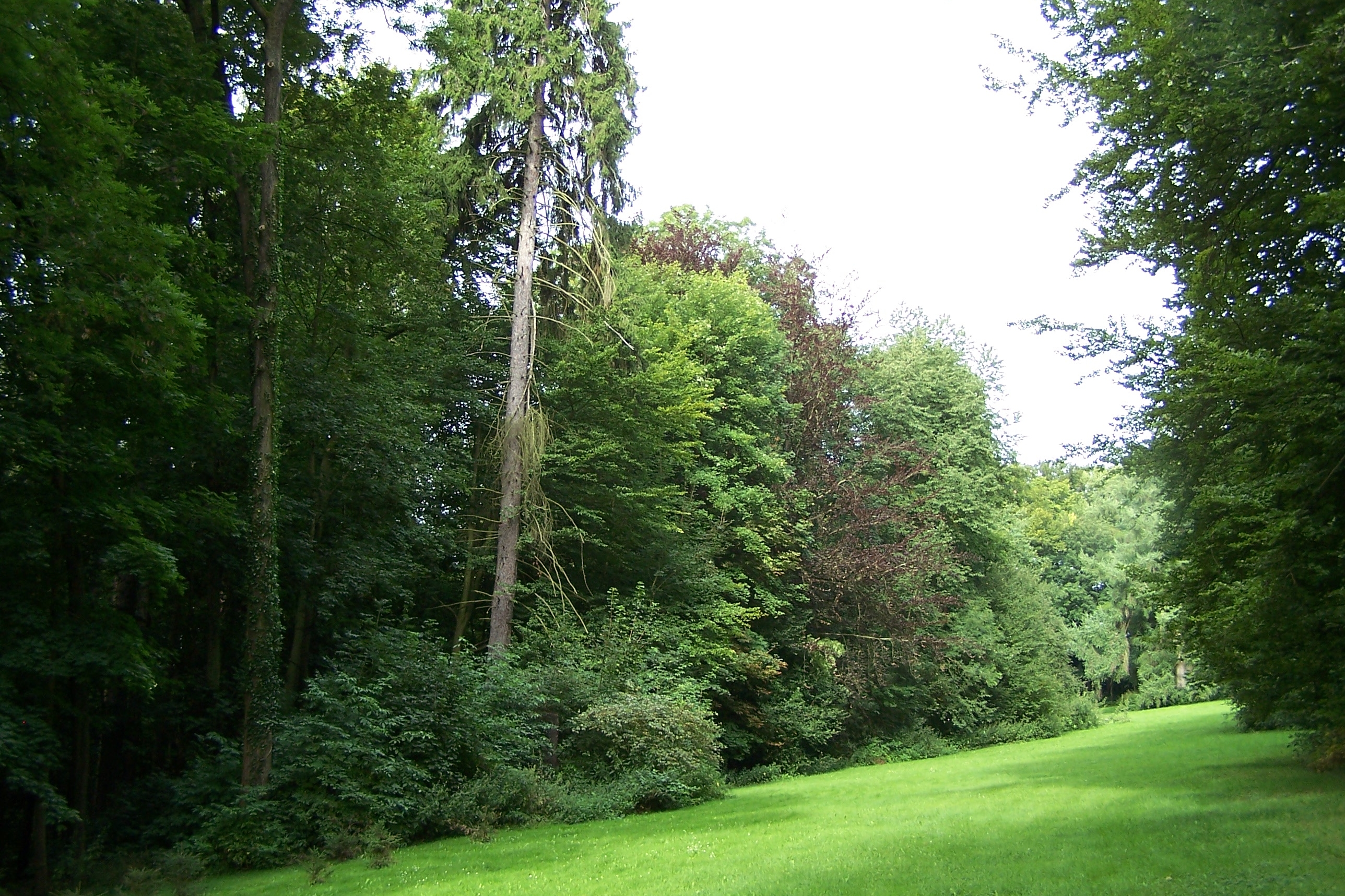 Ansichten und Details zum Volkspark in Gehaus.